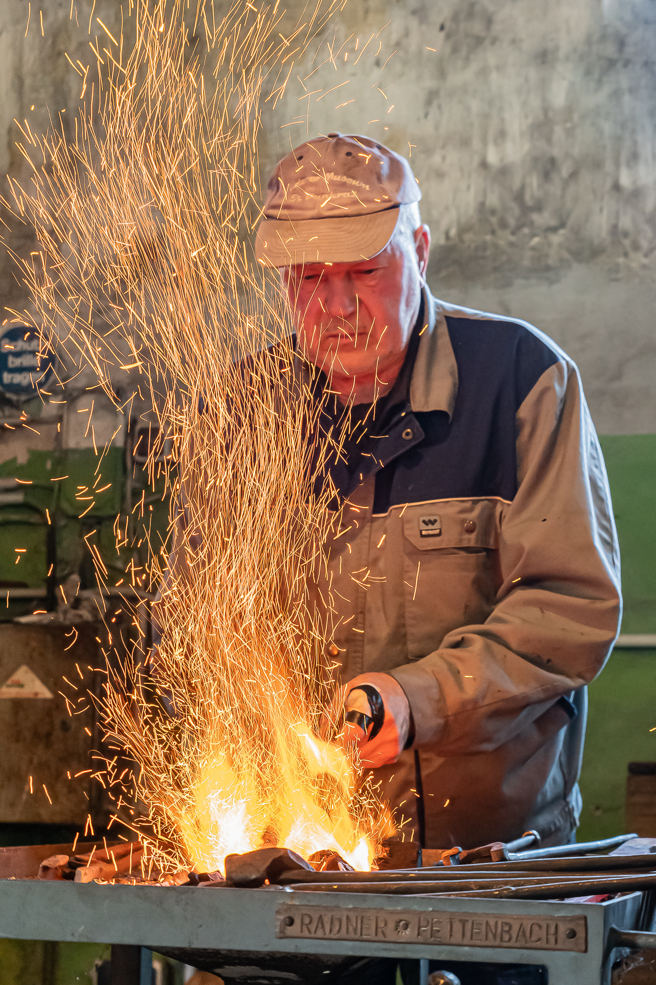 Der Schmied Hubert Wagner am Schmiedefeuer beim Erhitzen eines "Bröckls", dem Vormaterial für eine Sense, im Museum Geyerhammer in Scharnstein. Dieses Bild wurde anlässlich des österreichischen Tags des Denkmals 2019 in Oberösterreich eingereicht. Diese Datei wurde im Rahmen von WikiDaheim 2019 in Österreich erstellt und hochgeladen.Sie wurde dem Themenbereich Denkmalschutz zugeordnet.